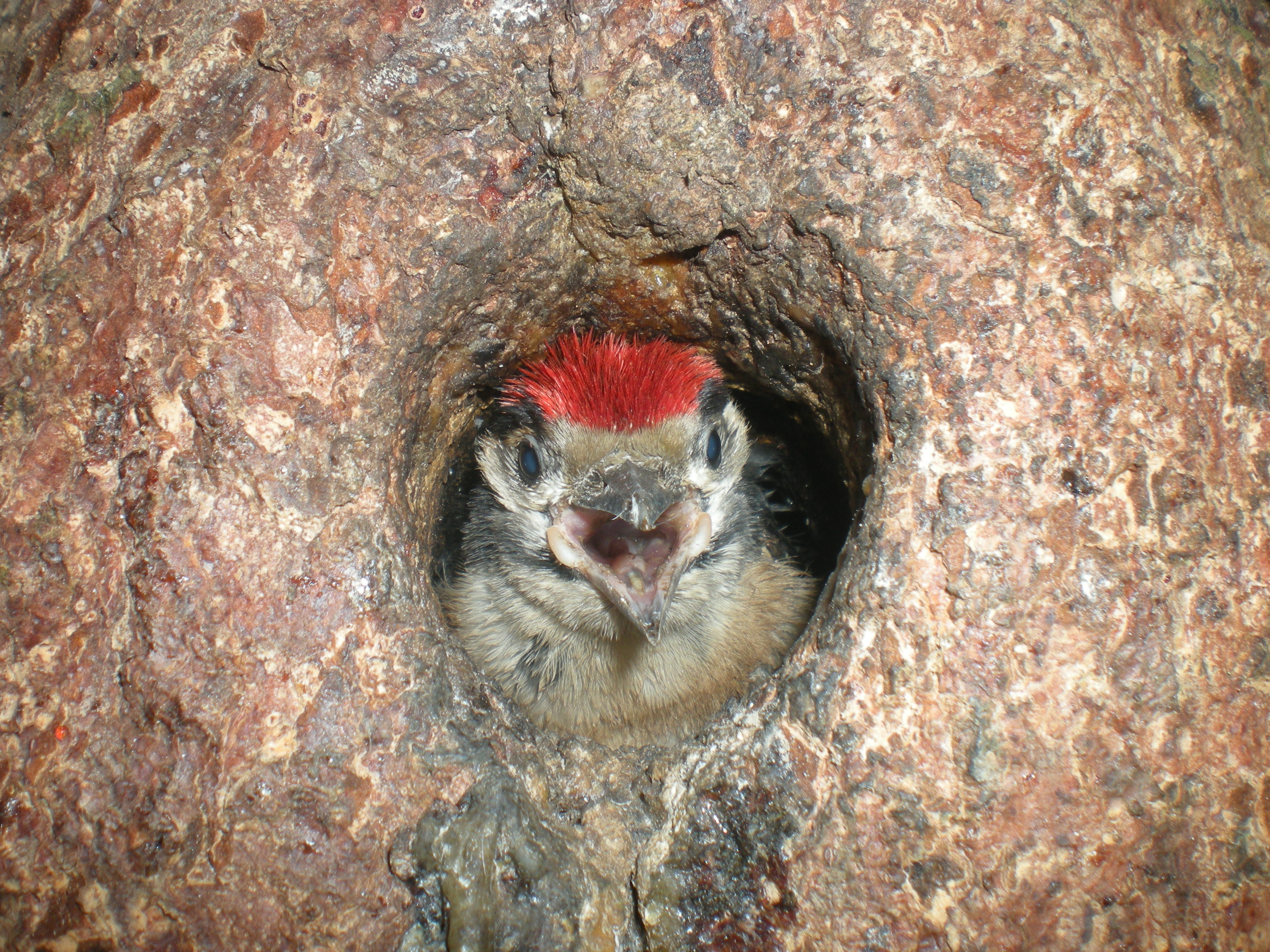 Dzięcioł duży (Dendrocopos major), Wólka Łękawska, Polska, 51°18'24"N, 19°23'34"E (51.3065, 19.3928)